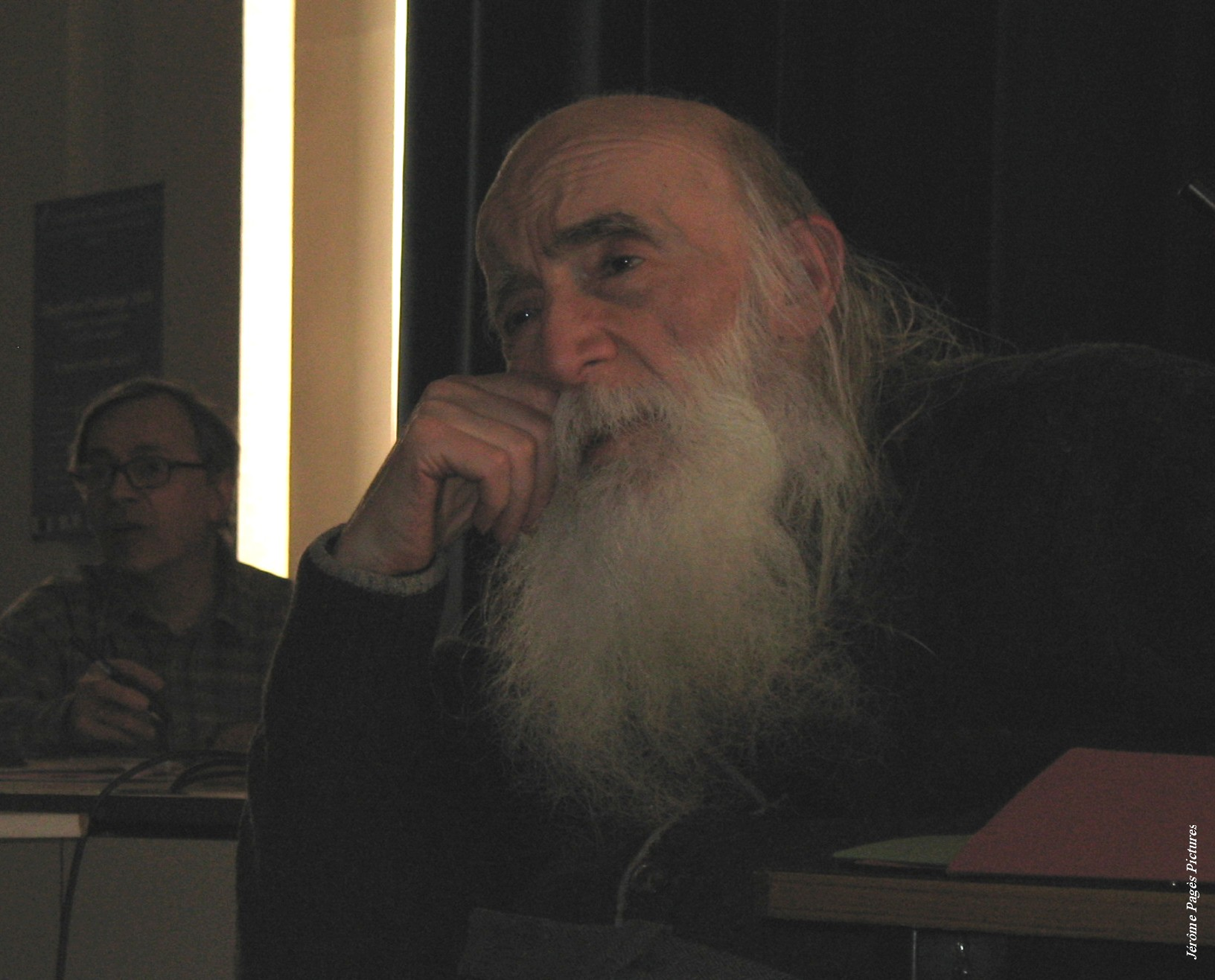 Jean-Paul Benzécri le 1er avril 2009, lors de la séance inaugurale du symposium SLDS à l'Université Paris-Dauphine. Cliché Jérôme Pagès.